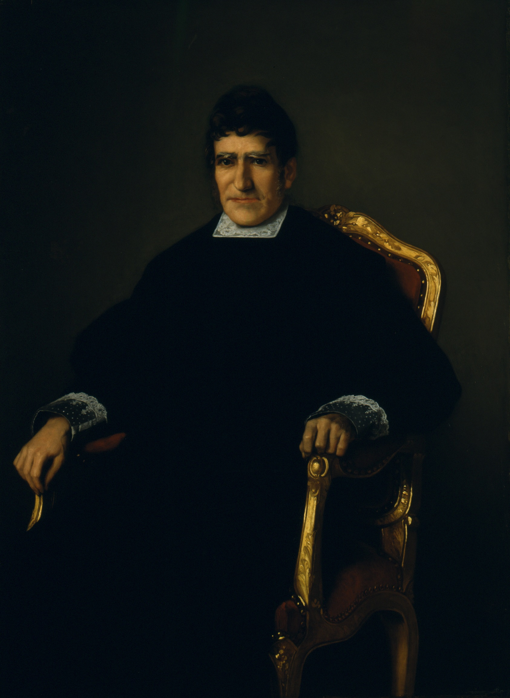 Retrato del politico español José María Calatrava y Martínez (1781-1846), que llegó a ser presidente del Gobierno de España y también presidente del Tribunal Supremo.